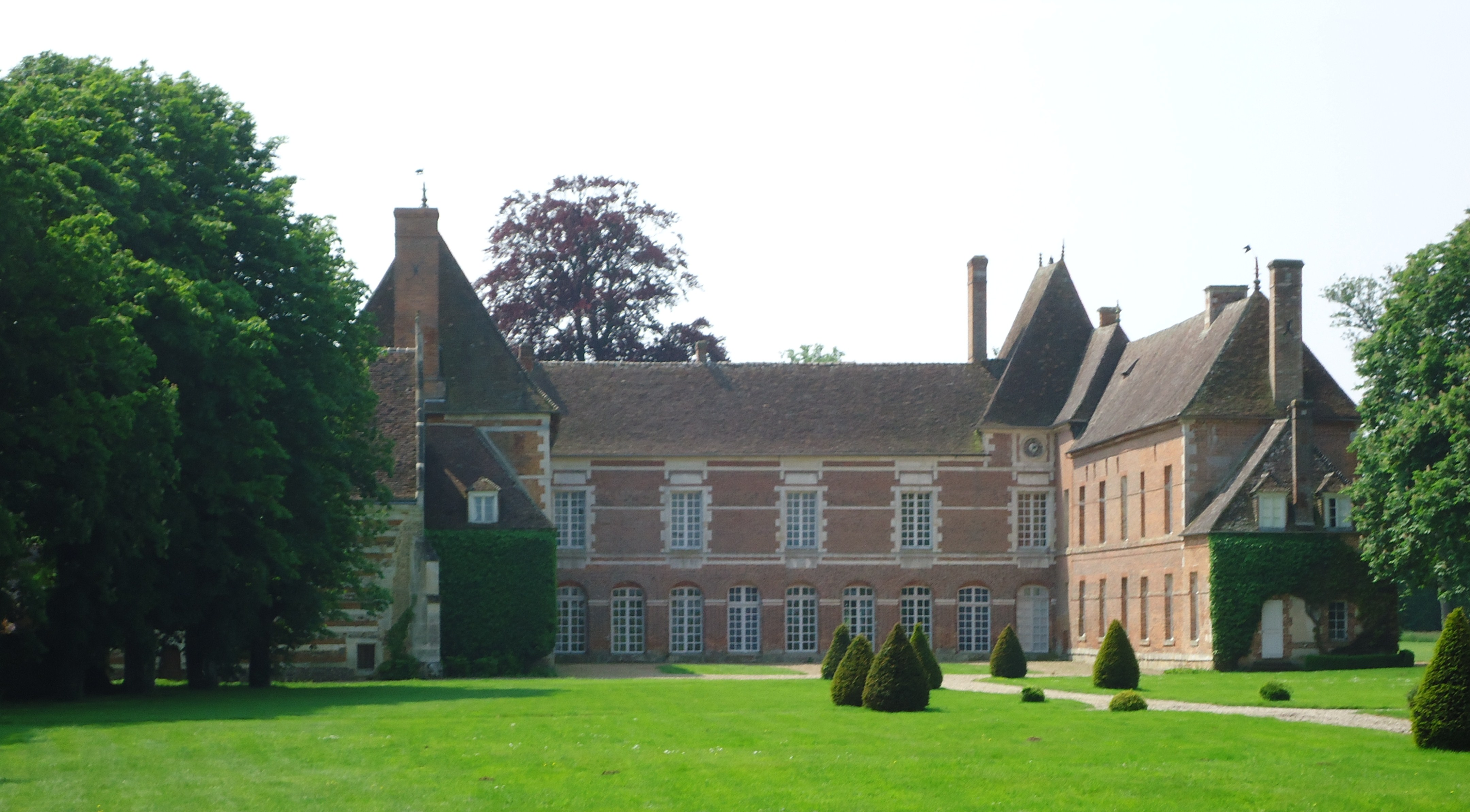 Grandvilliers - Chateau d'Hellenvilliers, XVe, XVIe, XVIIIe et XIXe (ISMH) - Façade nord